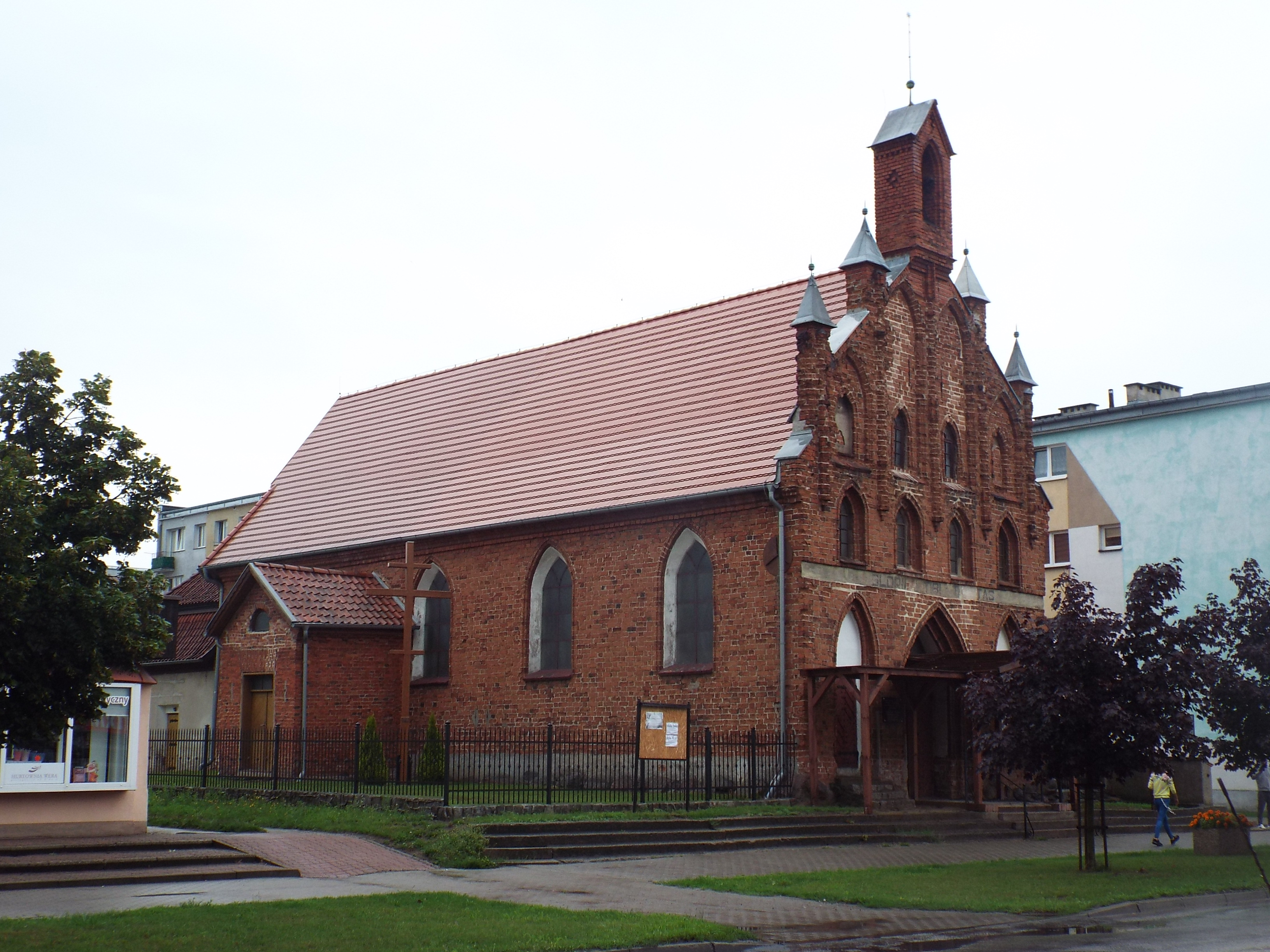 Braniewo, ul. Kościuszki 11 - kościół parafialny p.w. Świętej Trójcy, obecnie greckokatolicki, 1 poł. XV, 1583-1584, 1681, XVIII w.